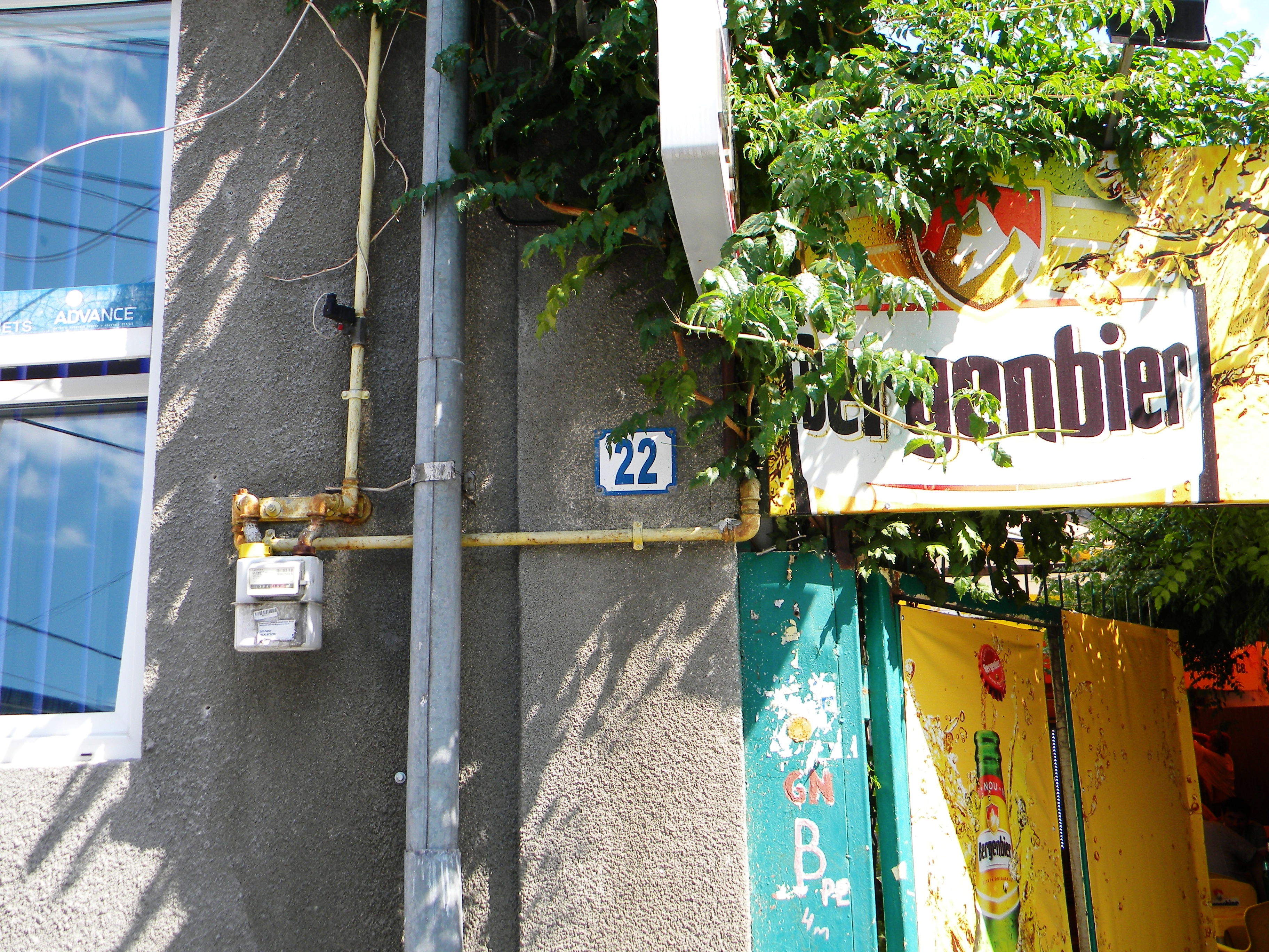 Bucuresti, Romania, Str. Atelierului nr. 22, sect. 1; B-II-m-B-18013 (detaliu 3)